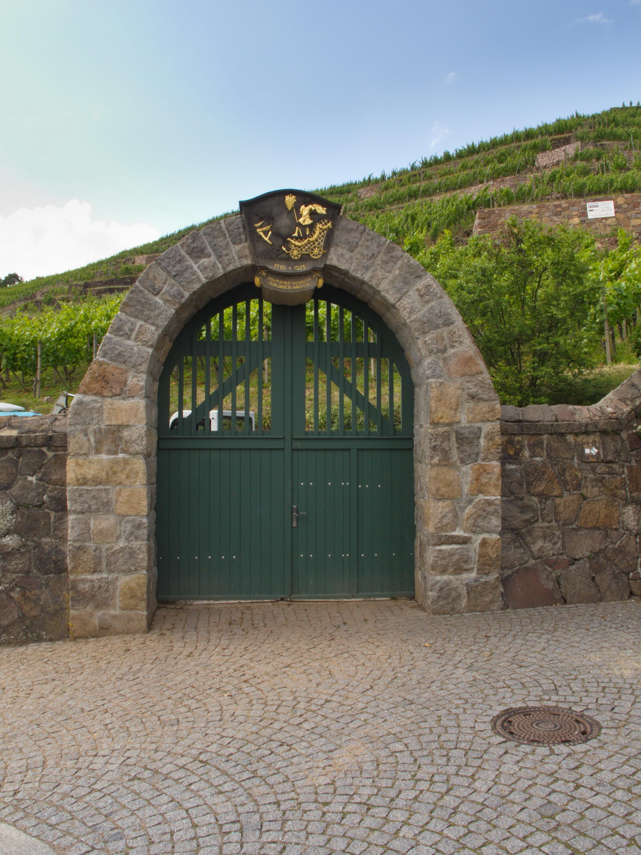 Radebeul, Portal Goldener WagenAm Goldenen Wagen, Denkmalspflege: Wagen 9000 -I